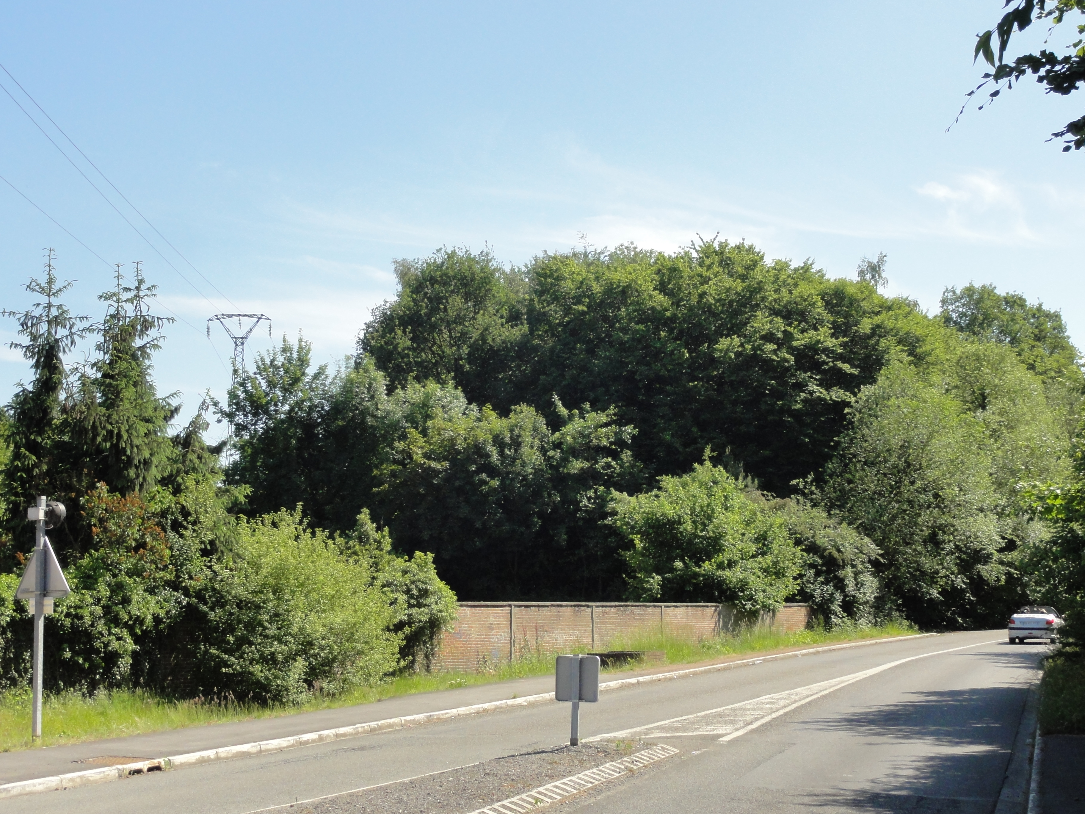 Terril n° 219 dit Vicoigne n° 2, Fosse n° 2 de la Compagnie des mines de Vicoigne, Raismes, Nord, Nord-Pas-de-Calais, France.